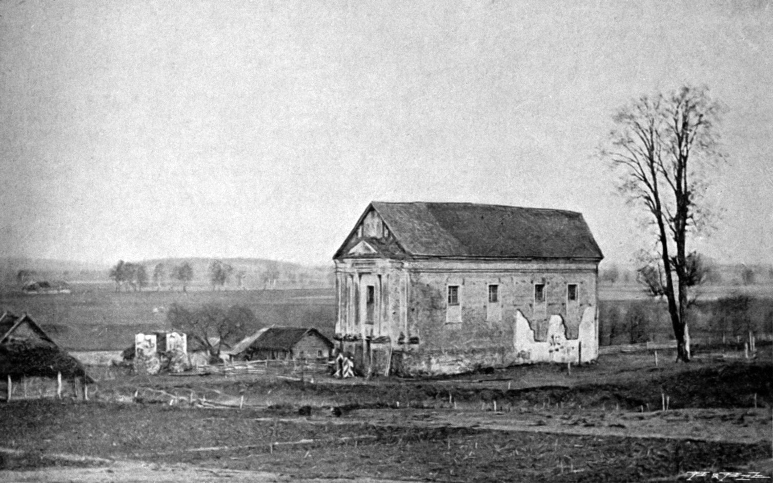 Беларуская (тарашкевіца): Ашмяны (Ašmiany), вуліца Францішканская (vulica Franciškanskaja). Касьцёл пры кляштары францішканаў.